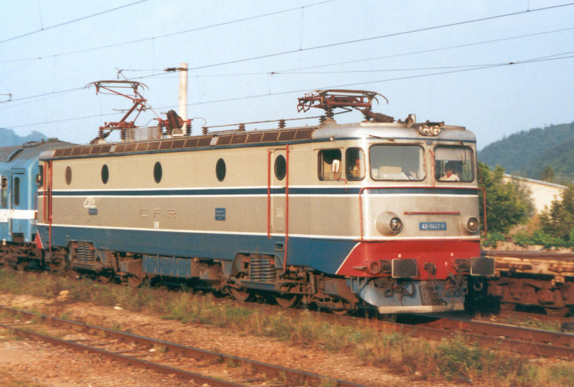 Six-axle electric locomotive 40-0442-0 SNCFR.